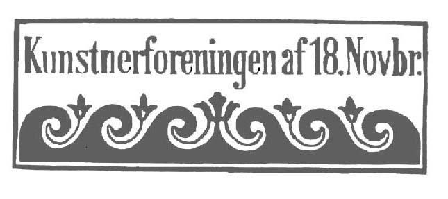 Logoet er fra 1867 og tegnet eller rettere skåret til Kunstnerforeningen af 18. nov. af gravør Danielsen.